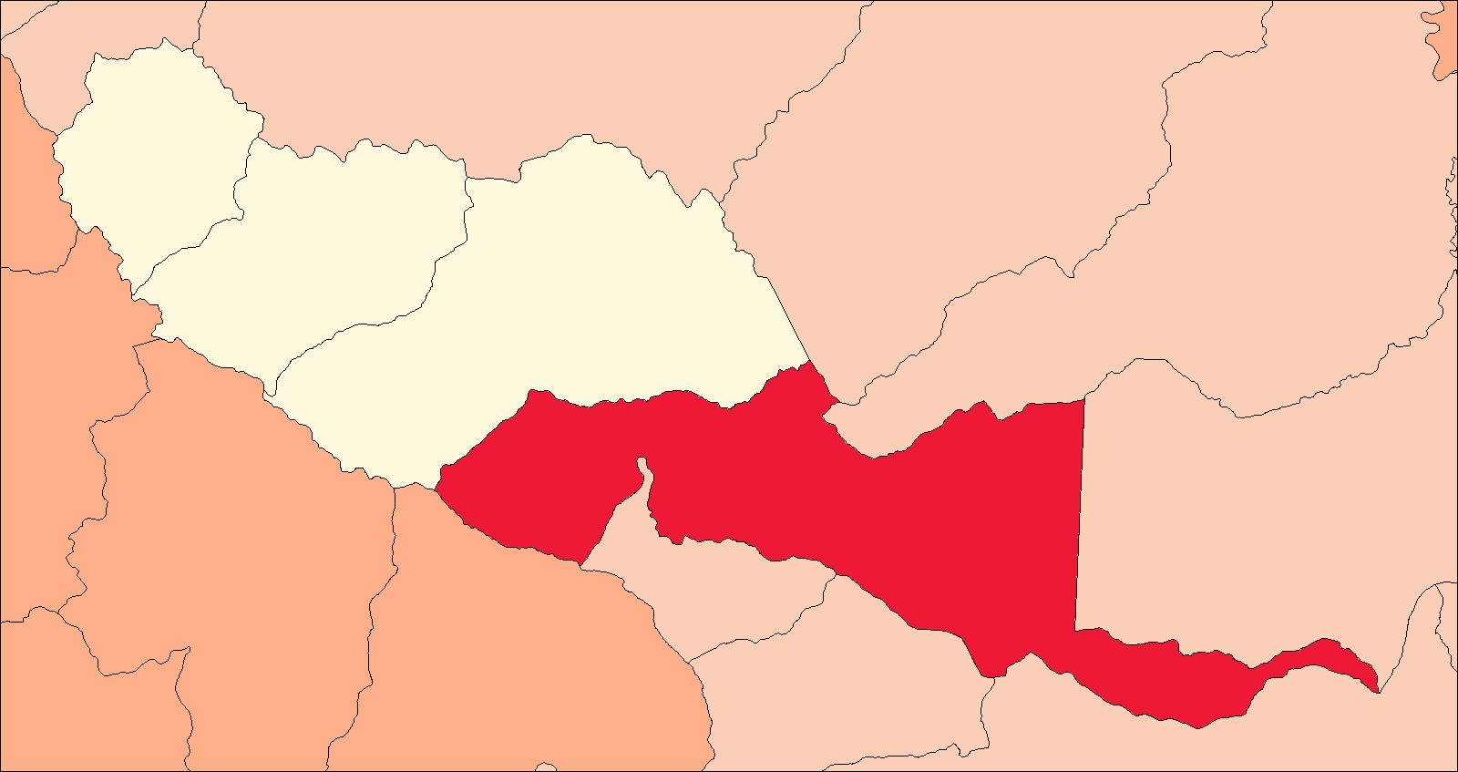 Área del distrito de Cochabamba (Huacaybamba).